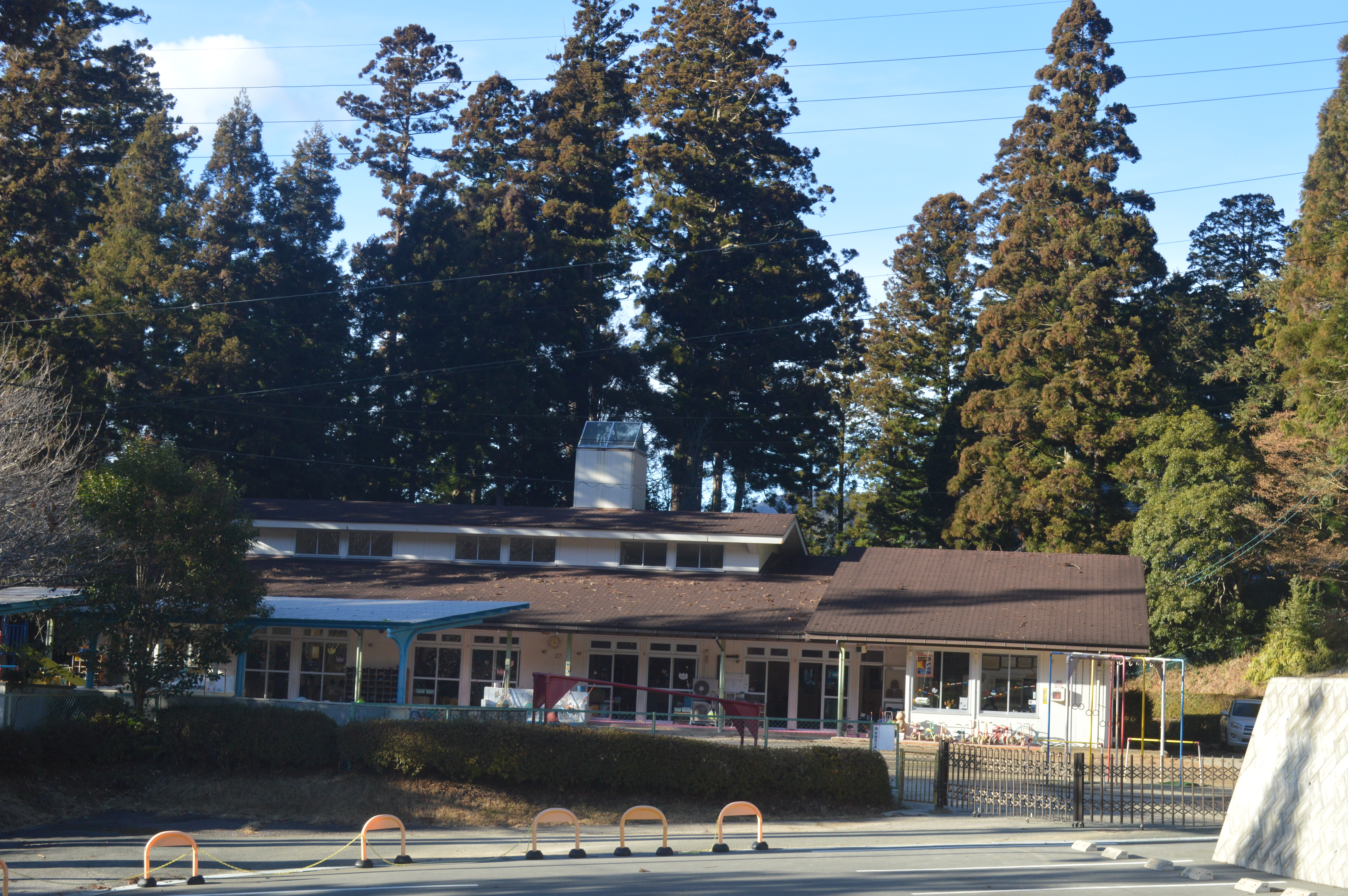 愛知県北設楽郡東栄町の本郷保育園。